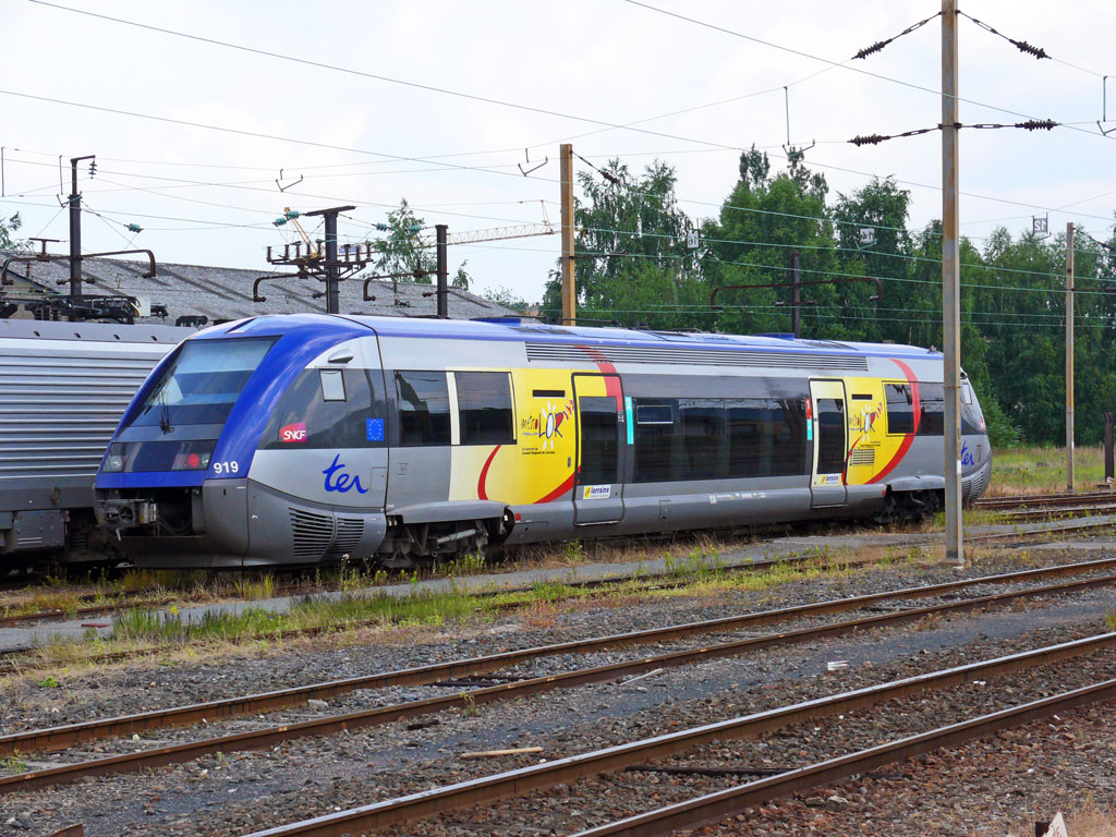 X 73919 du TER Lorraine stationné en gare de Forbach.